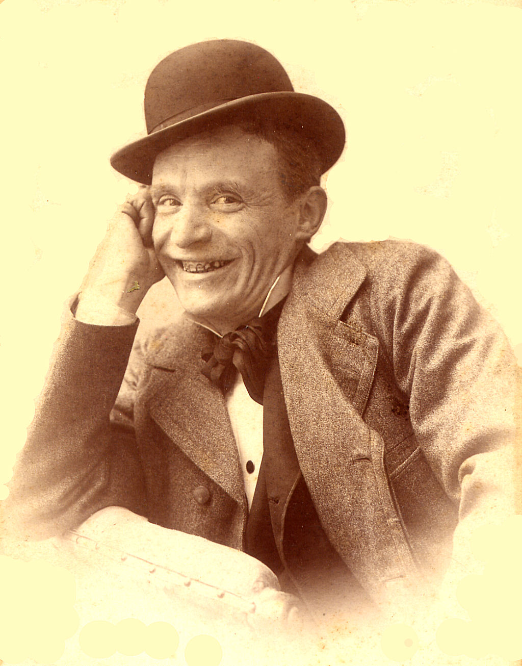 Fotografia distribuita gratuitamente dall'attore Ferruccio Benini ai fans dell'epoca